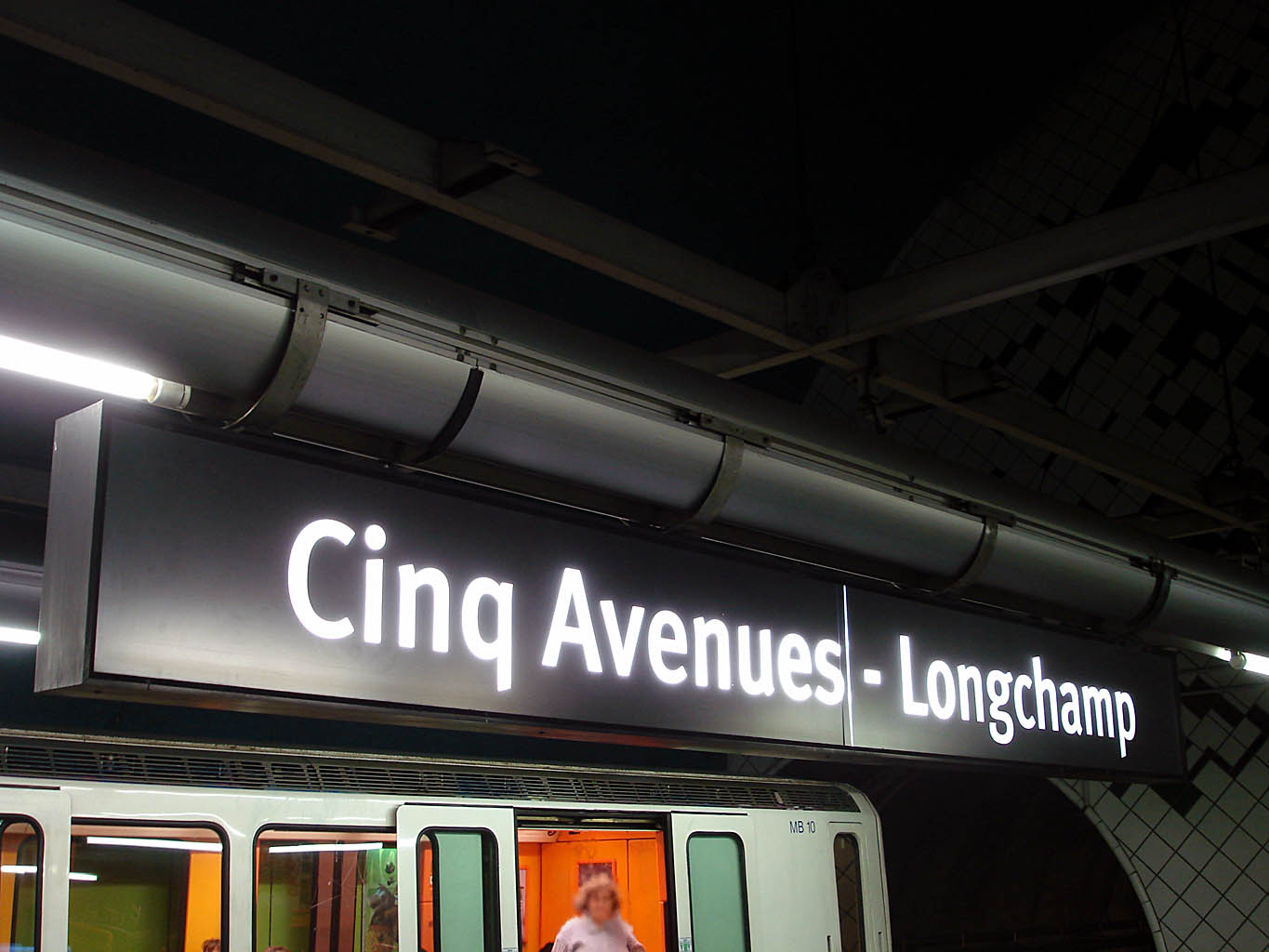 Station Cinq Avenues - Longchamp du métro de Marseille, France.